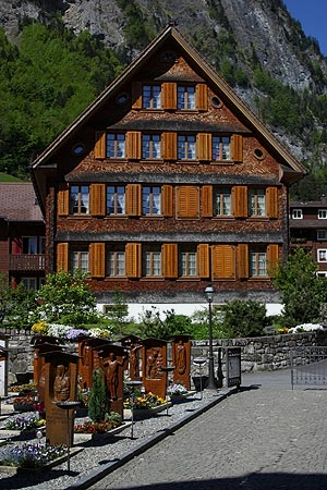 Friedhof und Raiffeisenbank in Isenthal (Nr. 03.1-4740)